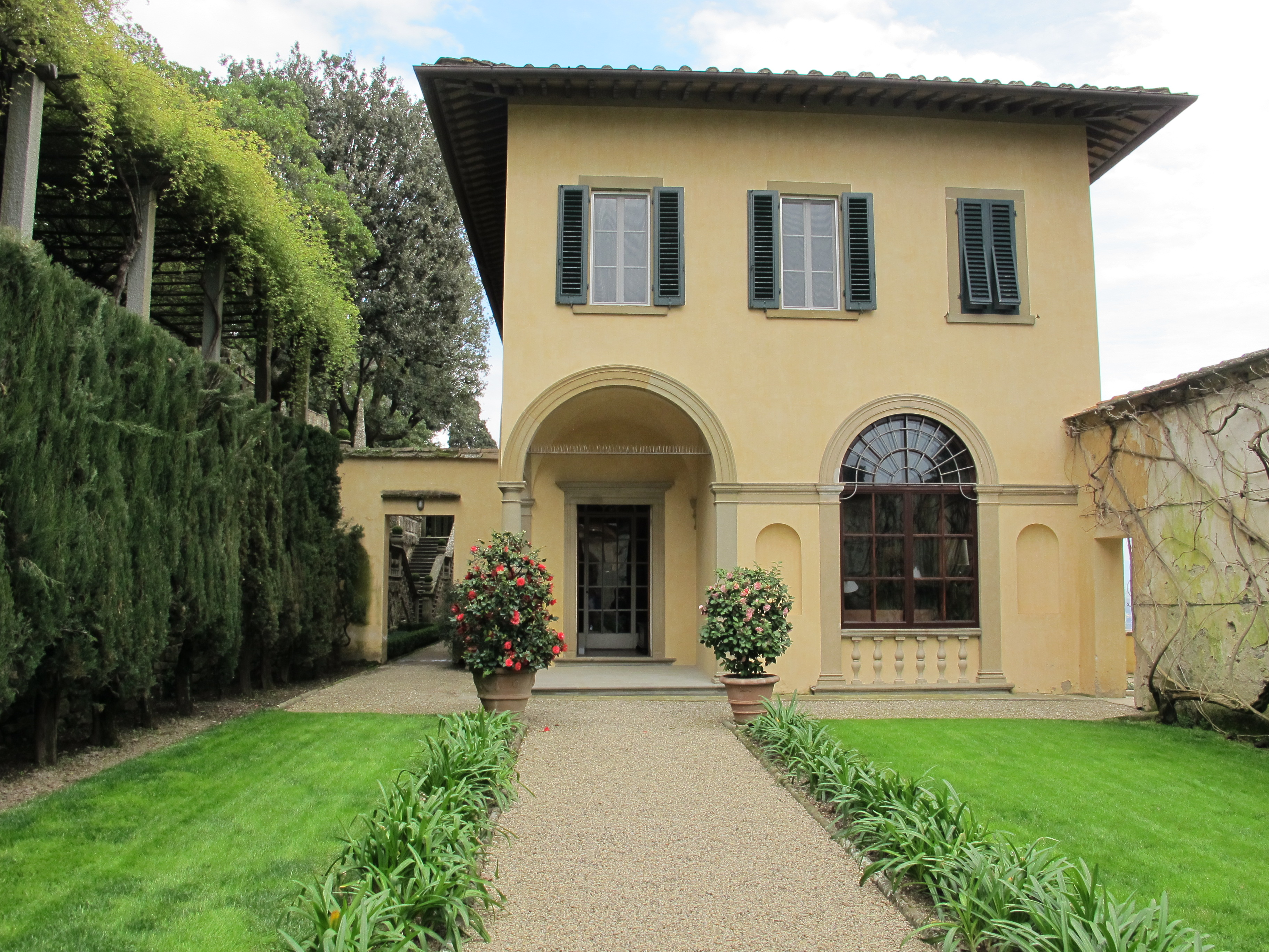 Le balze, giardino murato